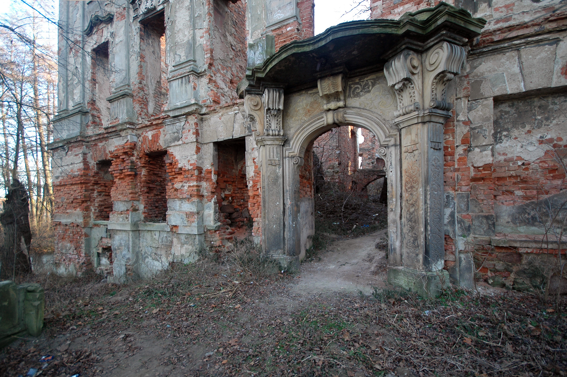 Krzydłowice - pałac (ruina) z parkiem (zabytek nr rejestr. A/2967/173/323/L z dn. 15.03.61)